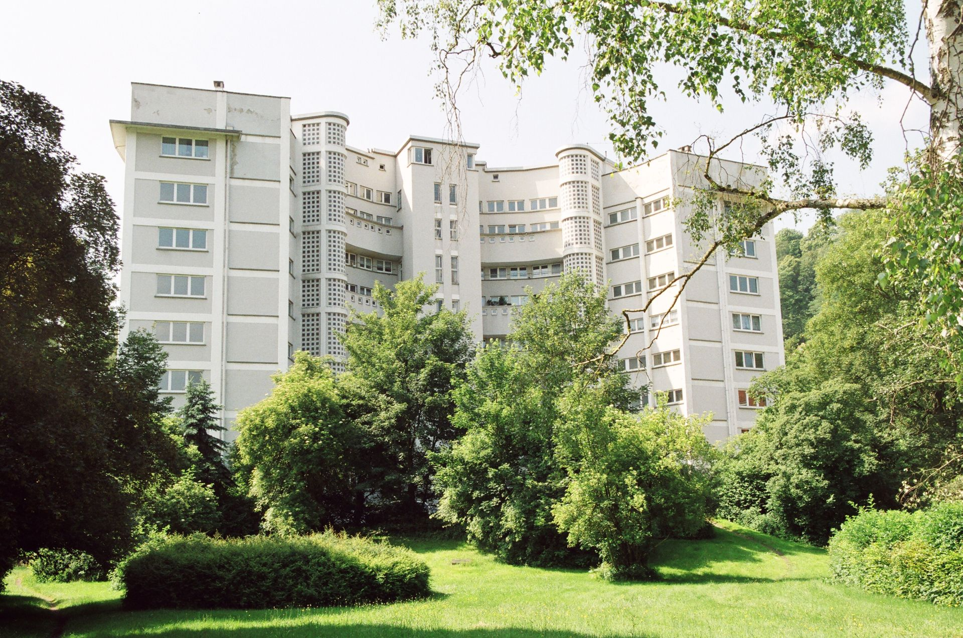 Einzeldenkmal im Stadtteil St. Arnual, Saarbrücken. Mit dem Bau des Habitat Stockenbruch 1949 versuchte der Architekt Jean Schoffit nicht nur die große Wohnungsnot in Saarbrücken zu lindern, sondern er berücksichtigte die modernen, städtebaulichen Leitbilder der Charta von Athen 1933. Das Beamtenhaus war aber nicht nur einfach Wohnraum für Regierungsangestellte, sondern ein Gebäude mit höchster technischer Ausstattung, einem für diese Zeit unvergleichlichen Luxus für die Bewohner und ein besonderes Gebäude in seiner architektonischen Ausgestaltung. Es hat einen bogenförmigen Grundriss, wobei die Aufenthaltsräume nach Süden ausgerichtet sind und sich am Innenbogen, auf der Nordseite, nur Funktionsräume und Verkehrsflächen befinden. Die Erschließung erfolgt über zwei Aufzüge, welche im Mittelrisalit an der Nordseite untergebracht sind und über die zwei halbrundenTreppenhäusern aus Glasbausteinen. Es gibt 2 bis 4-ZKB-Wohnungen. Den Abschluss bildet ein Flachdach mit Dachaufbau und Dachterrasse. Auf der Dachterrasse befindet sich neben einer “offene Halle” und einer Wohnung auch noch ein zumindest geplanter “Kindergarten-Bereich”. Die Basis bildet ein 2-geschossiger Keller mit Kellerräumen für die Bewohner, Heizanlage, Werkräumen sowie Wasch-, Trocken- und Bügelräumen.